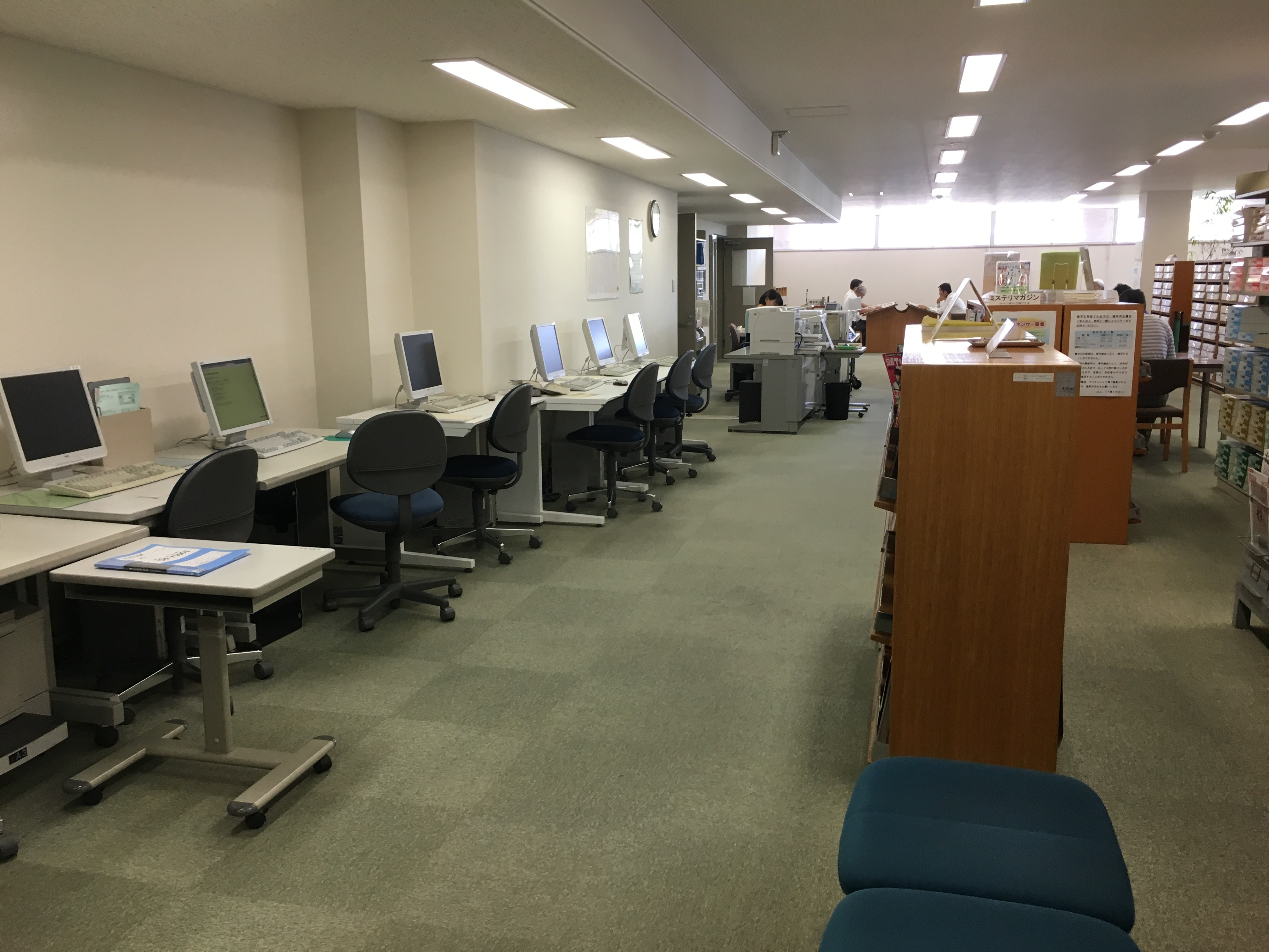 富山県立図書館新聞雑誌閲覧室